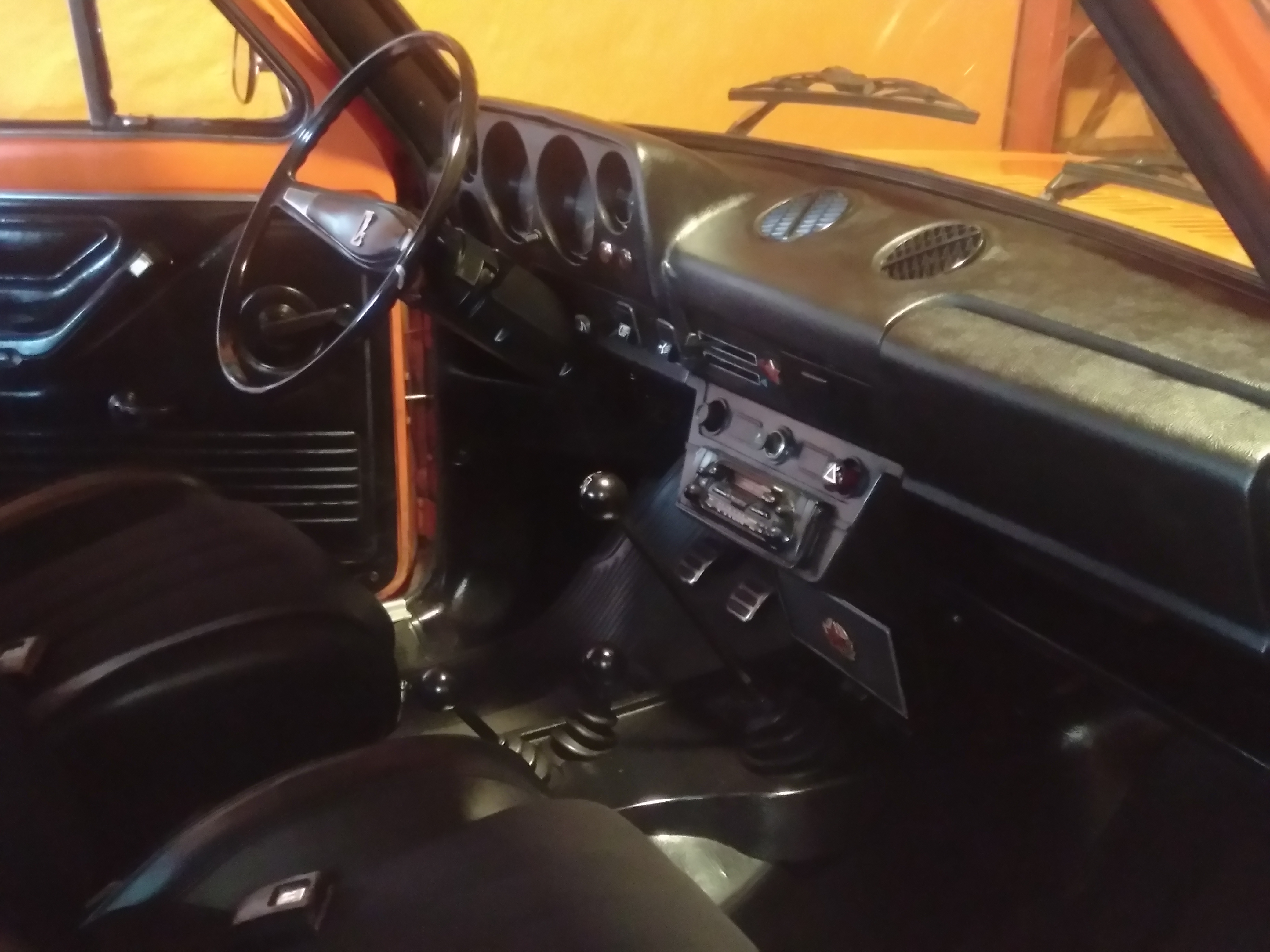 interior rustico